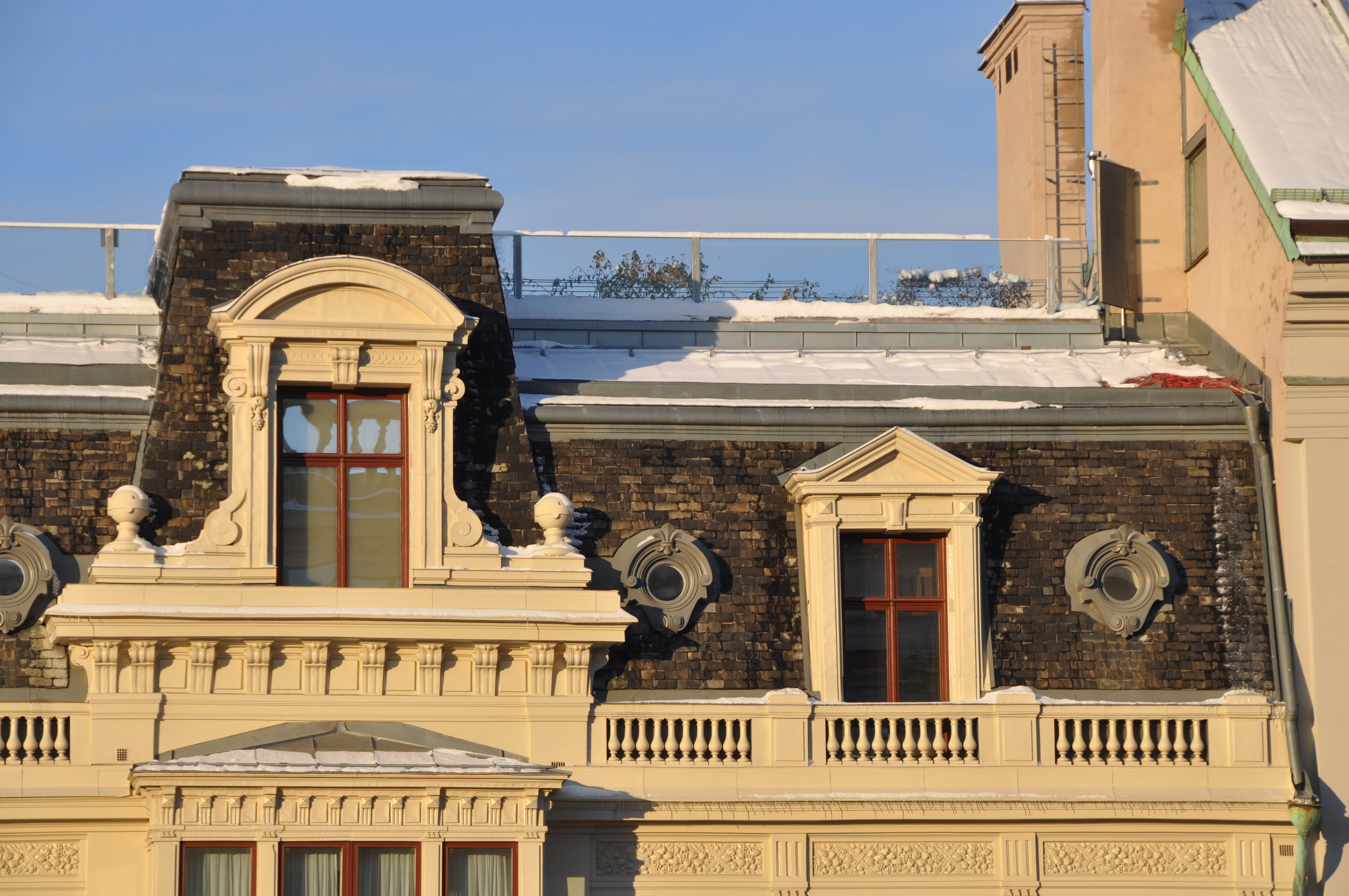 Sagersha huset